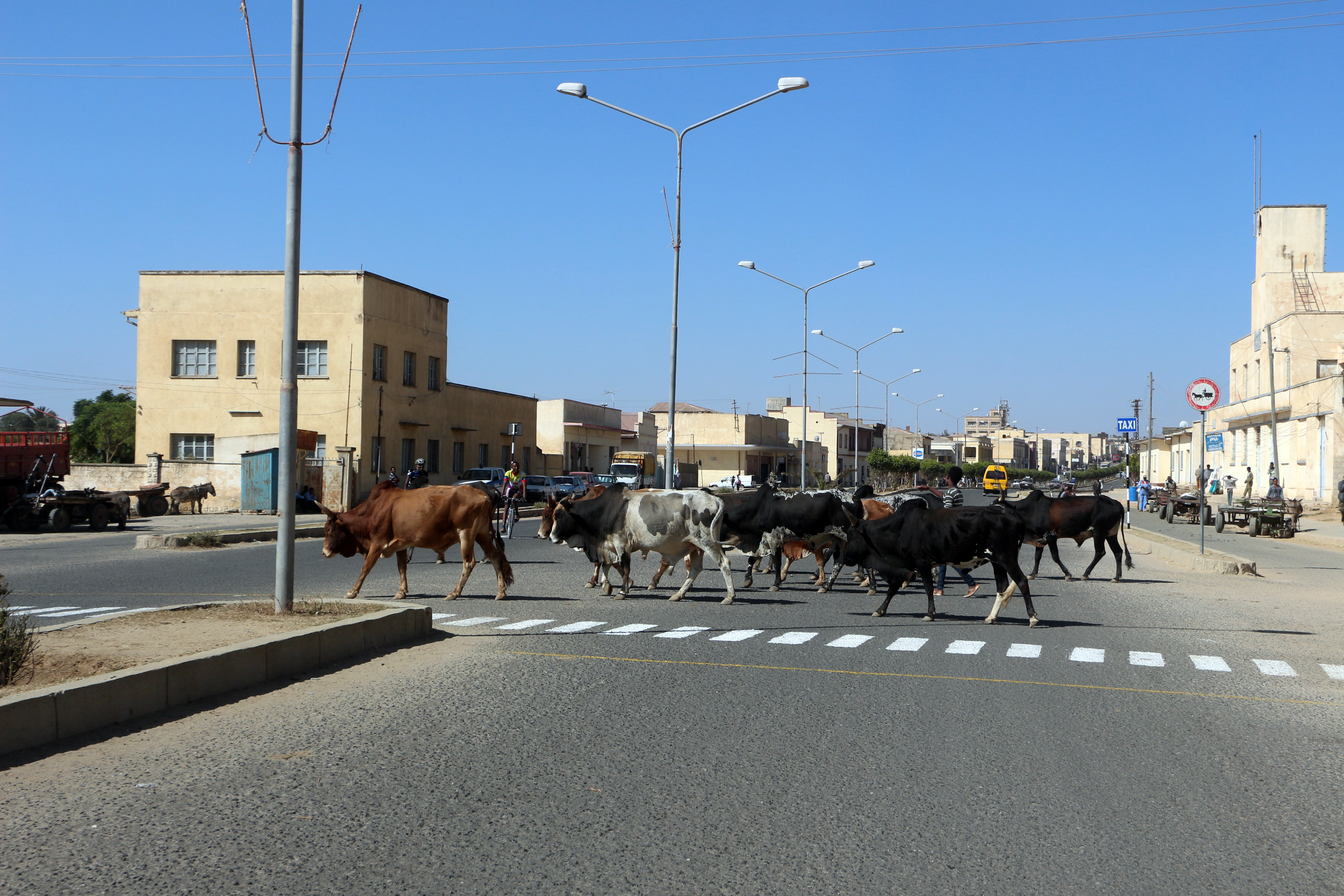 Dekemhare, strada principale con attraversamento buoi.JPG